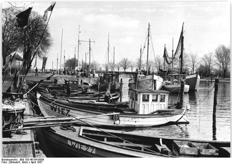 Greifswald, Wieck, Hafen Zentralbild Zühlsdorf 30.4.57. Schöne deutsche Heimat Der Hafen von Wieck bei Greifswald. [Fischerboote haben festgemacht.]